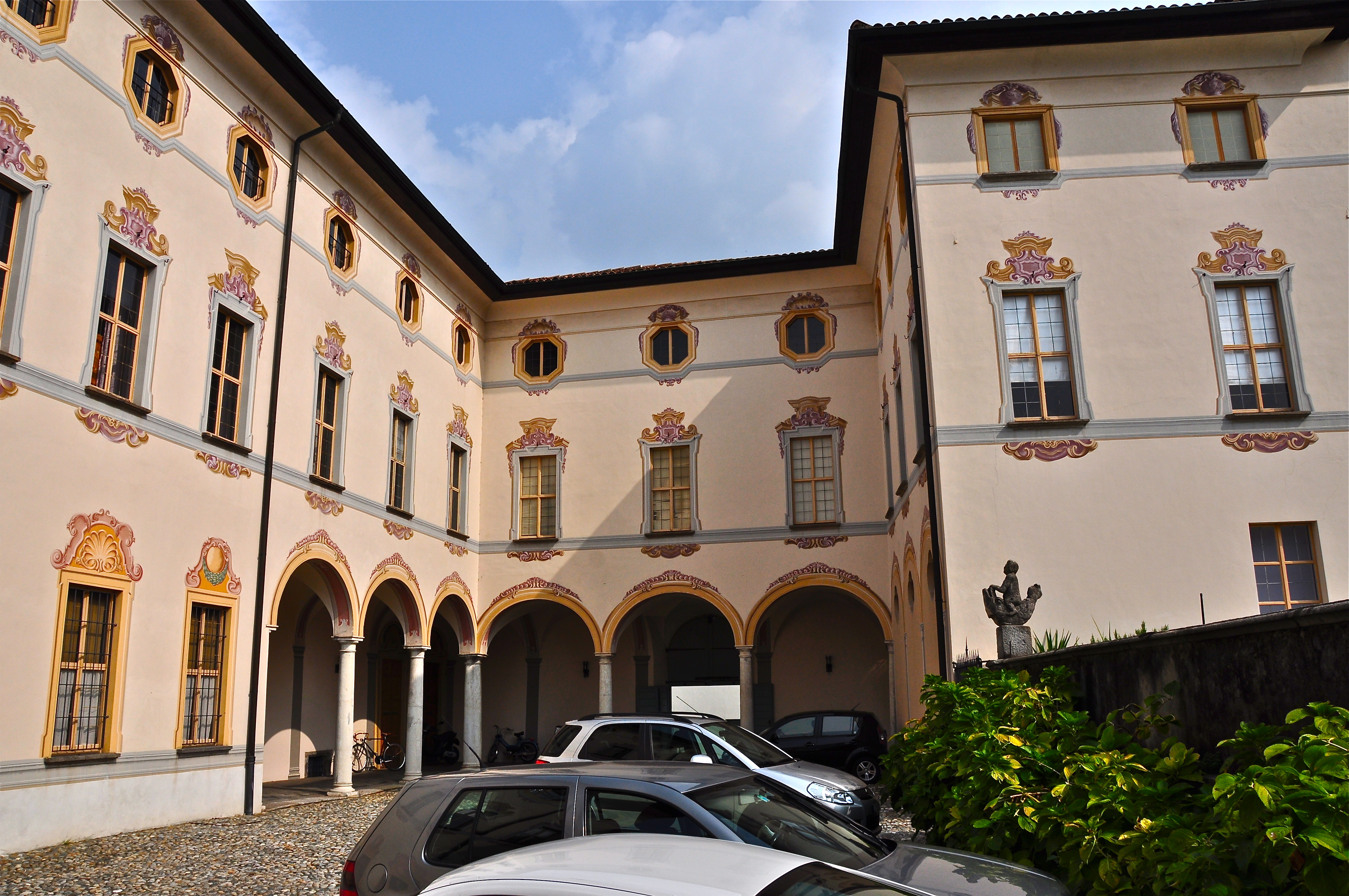 Cortile